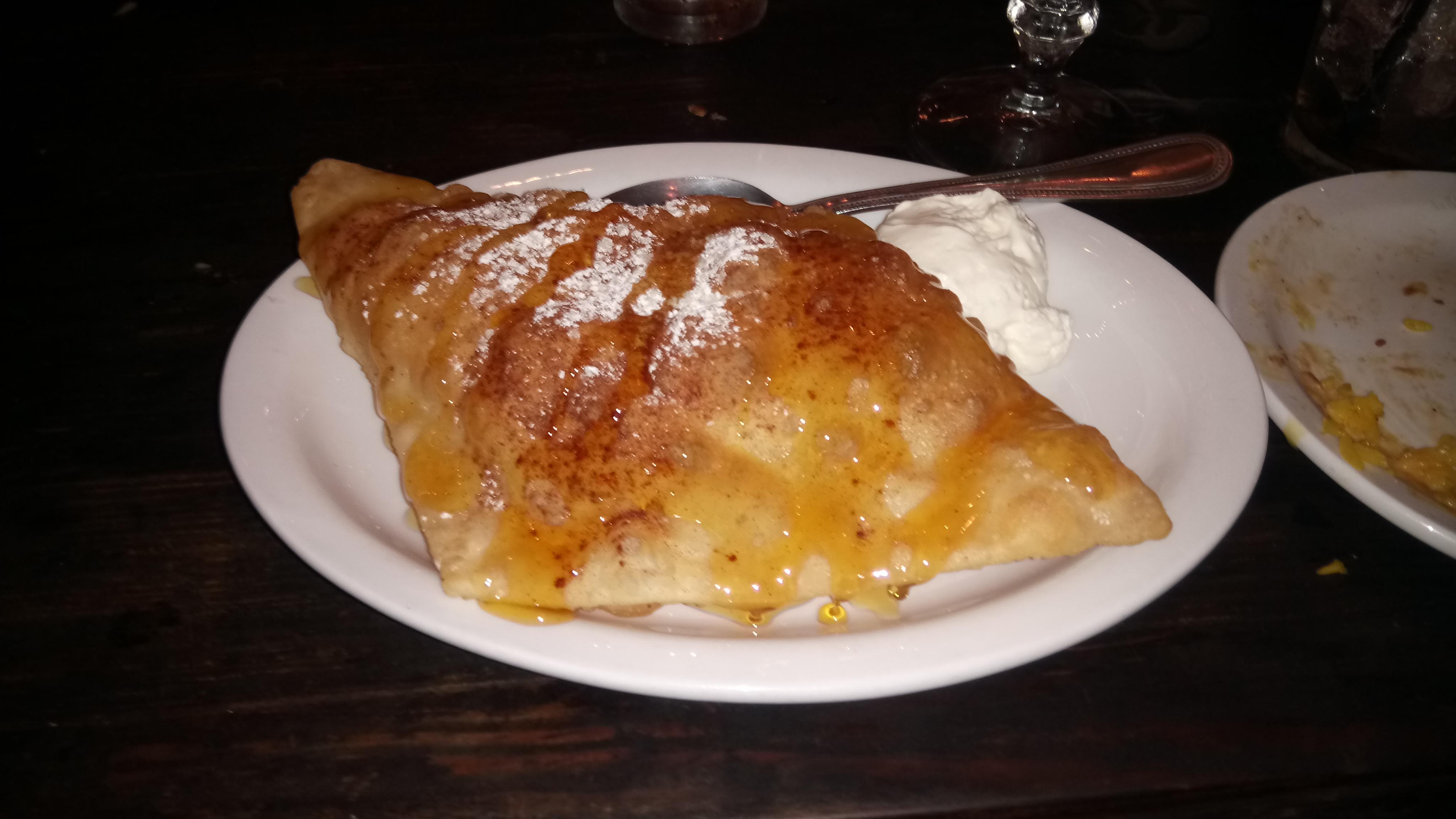 Ninfa's sopapillas